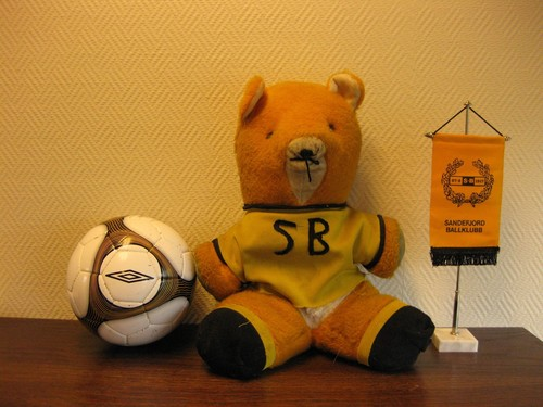 Bilde av Sandefjord Ballklubbs bamsemaskot